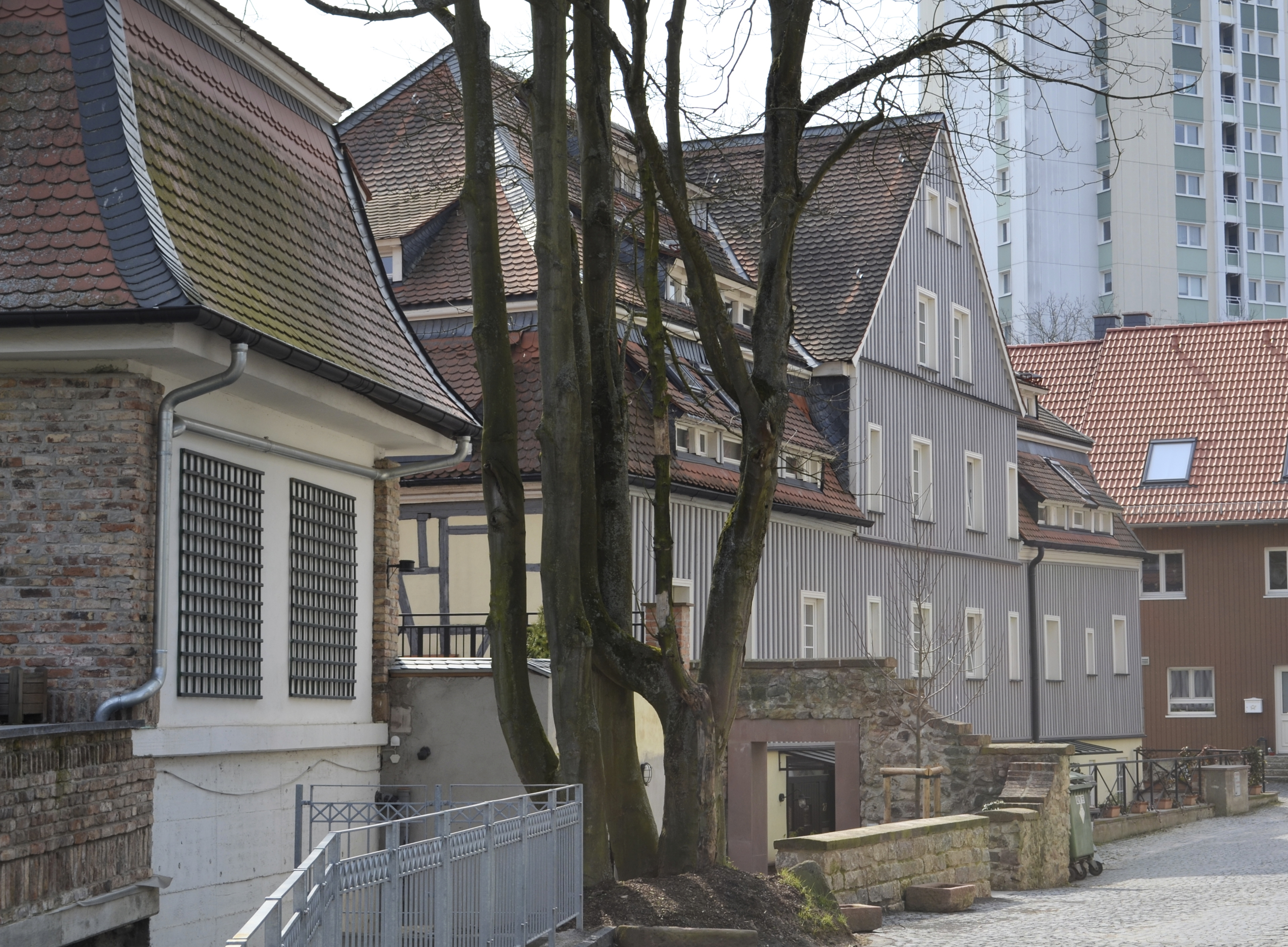 Niederursel, Niederursel, Krautgartenweg 3